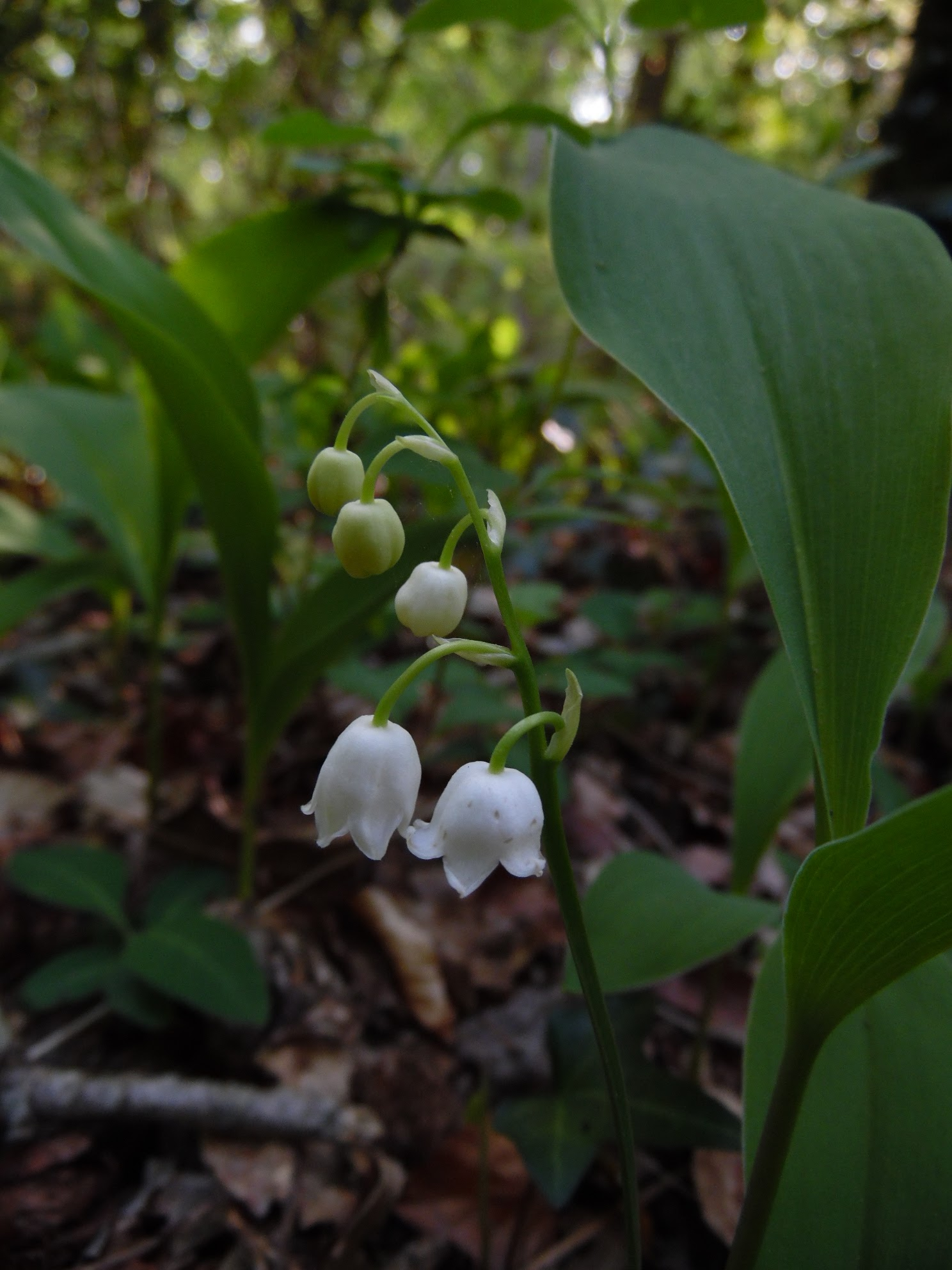 Muguet (Convalaria majalis) en forêt de Mervent-Vouvant.